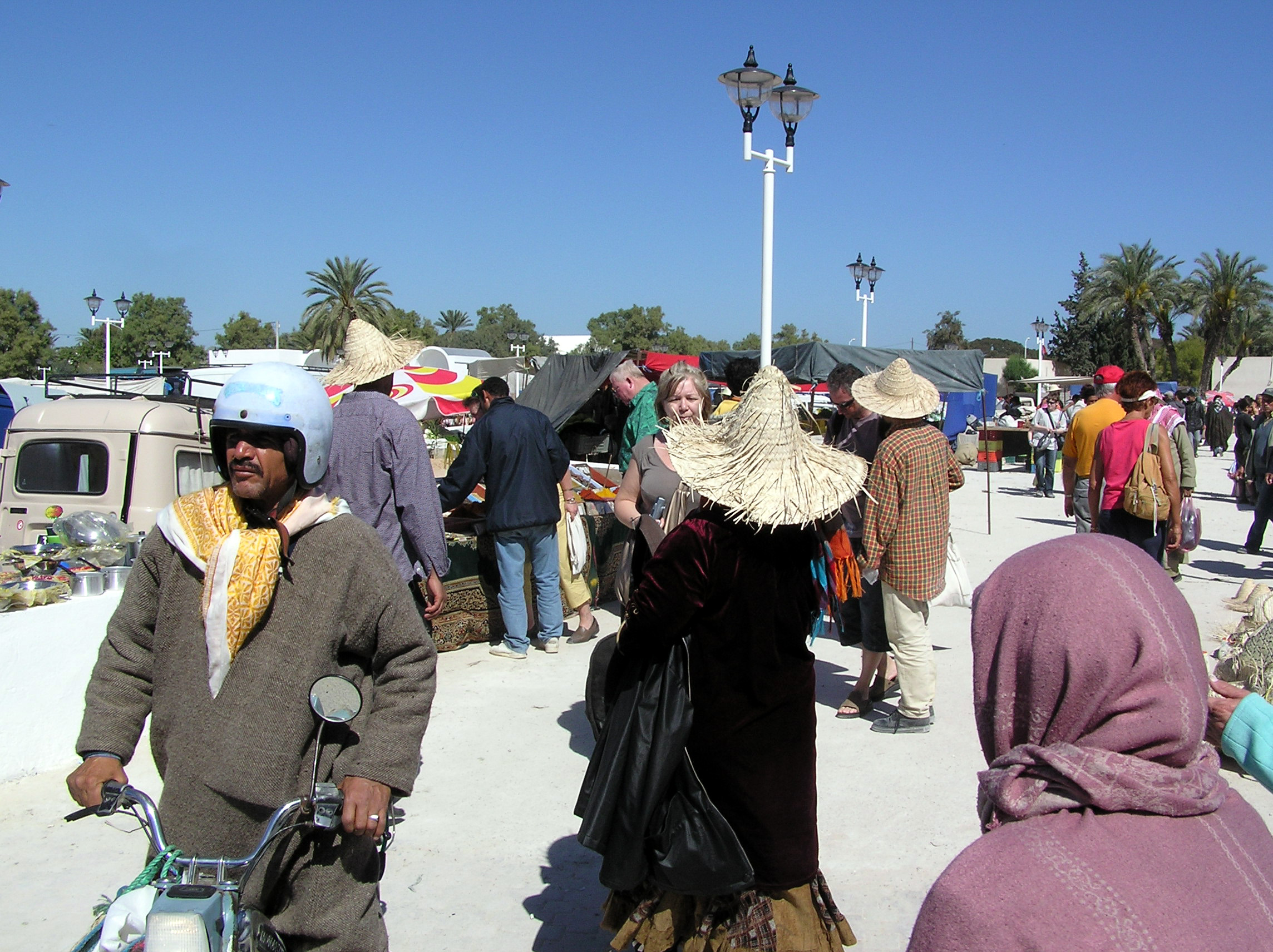 Bazar life